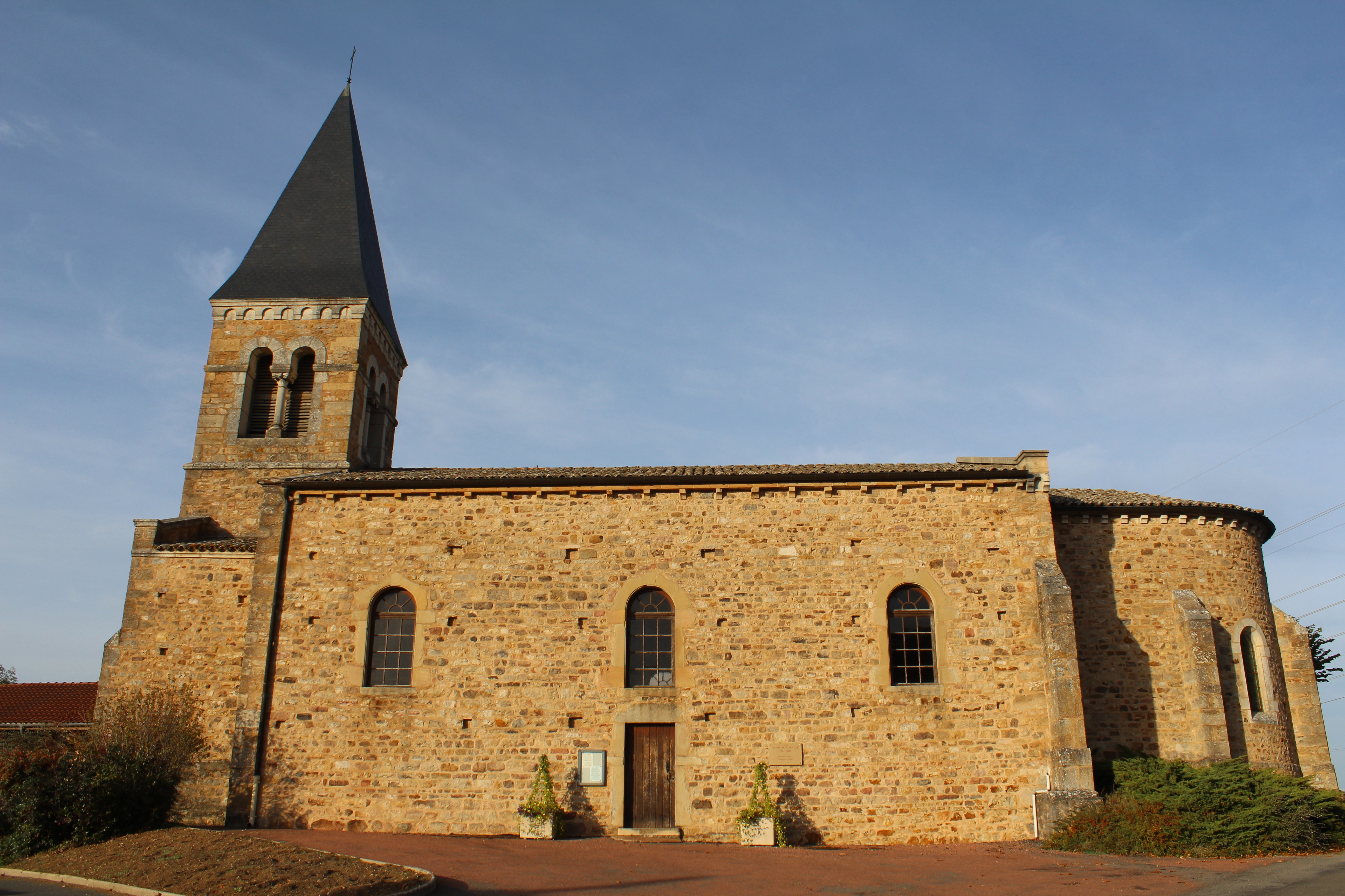 Église Saint-Jacques-le-Majeur de Serrières, Saône-et-Loire.